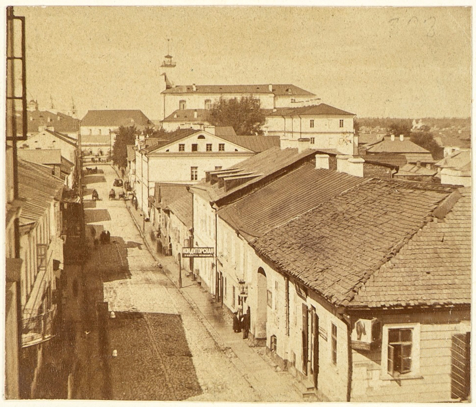 Беларуская (тарашкевіца): Менск (Miensk), вуліца Дамініканская (vulica Daminikanskaja). Удалечыні на рагу з Валоцкай — касьцёл Сьвятога Тамаша Аквінскага